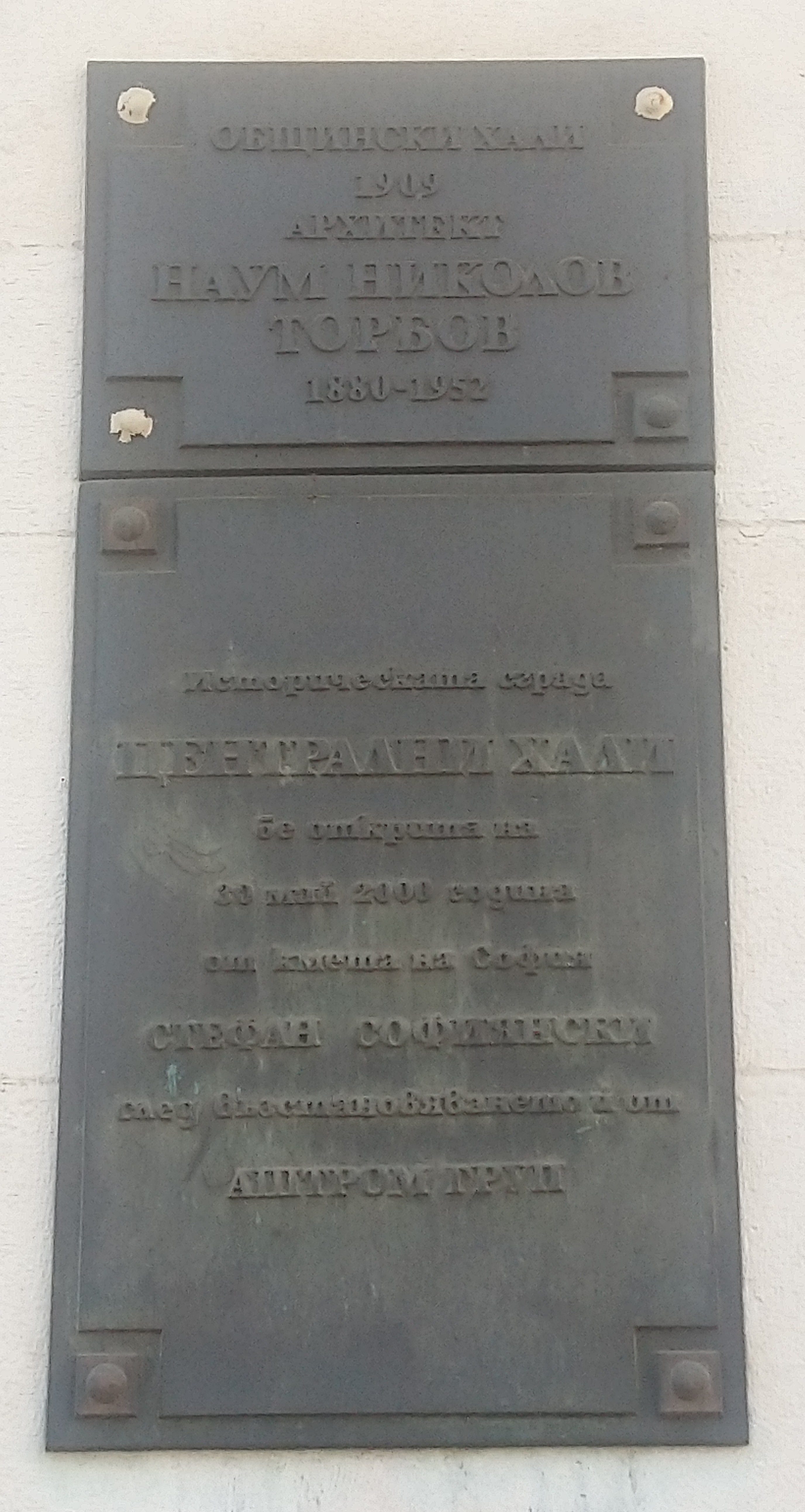 Паметна плоча на архитекта Наум Торбов, на български, Централни Хали, София